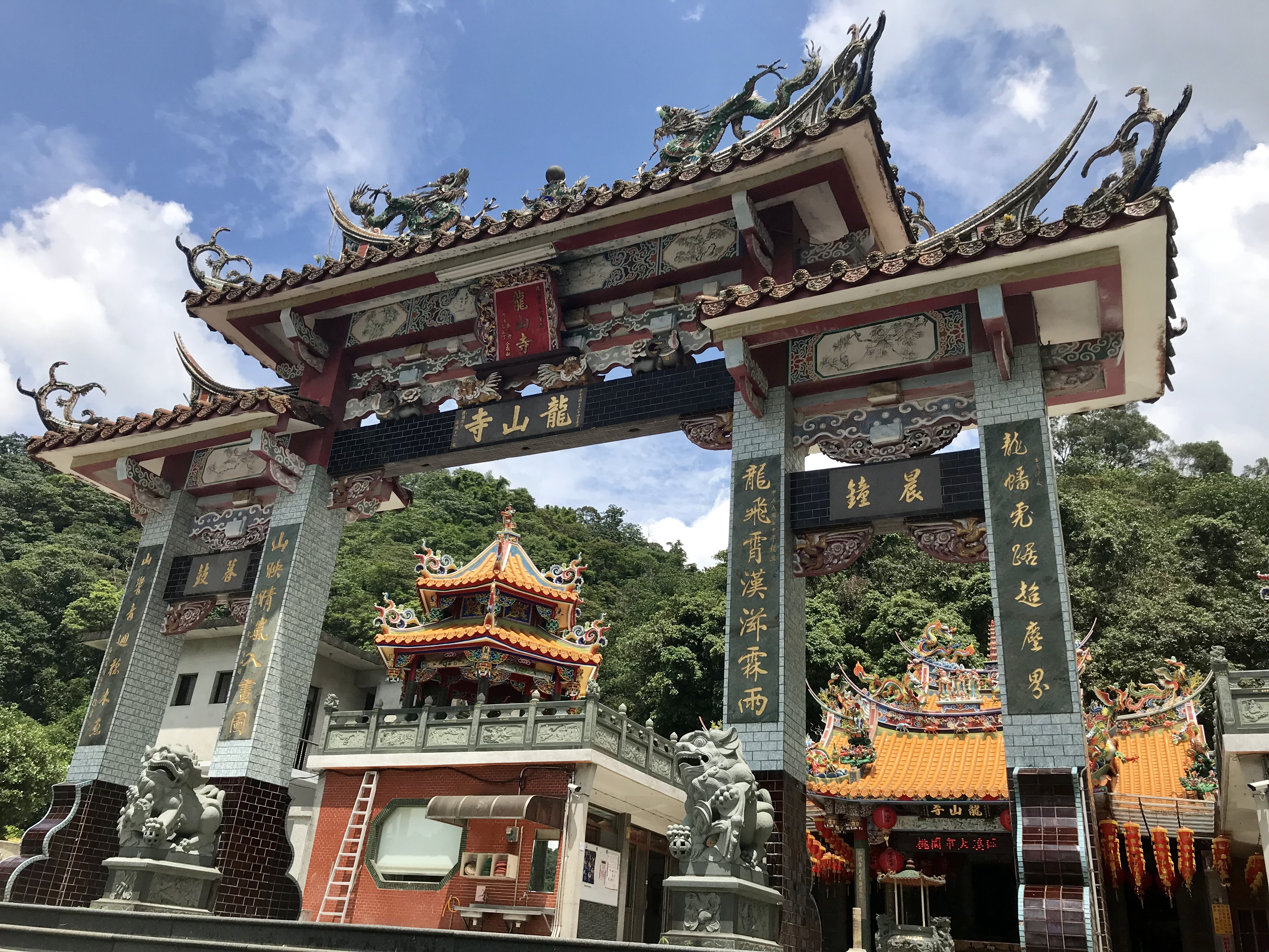 中文（台灣）: 大溪龍山寺牌樓